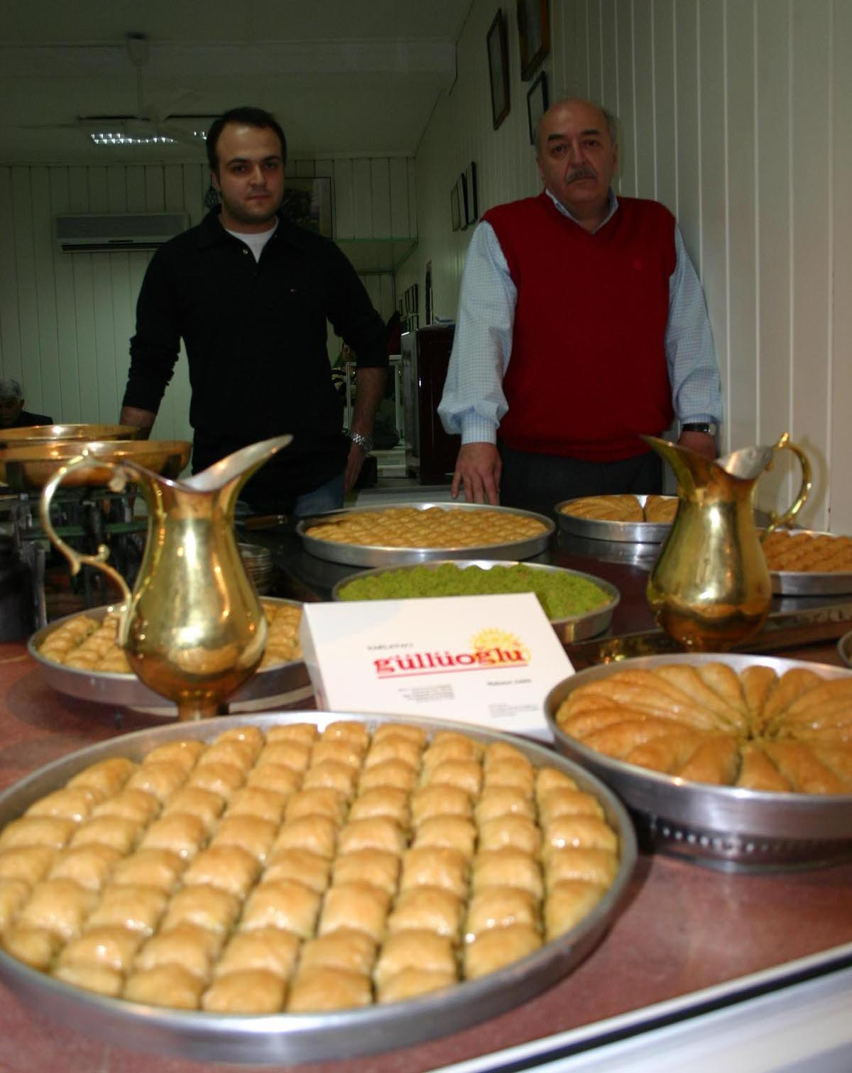 First baklava shop in Turkiye, Gaziantep